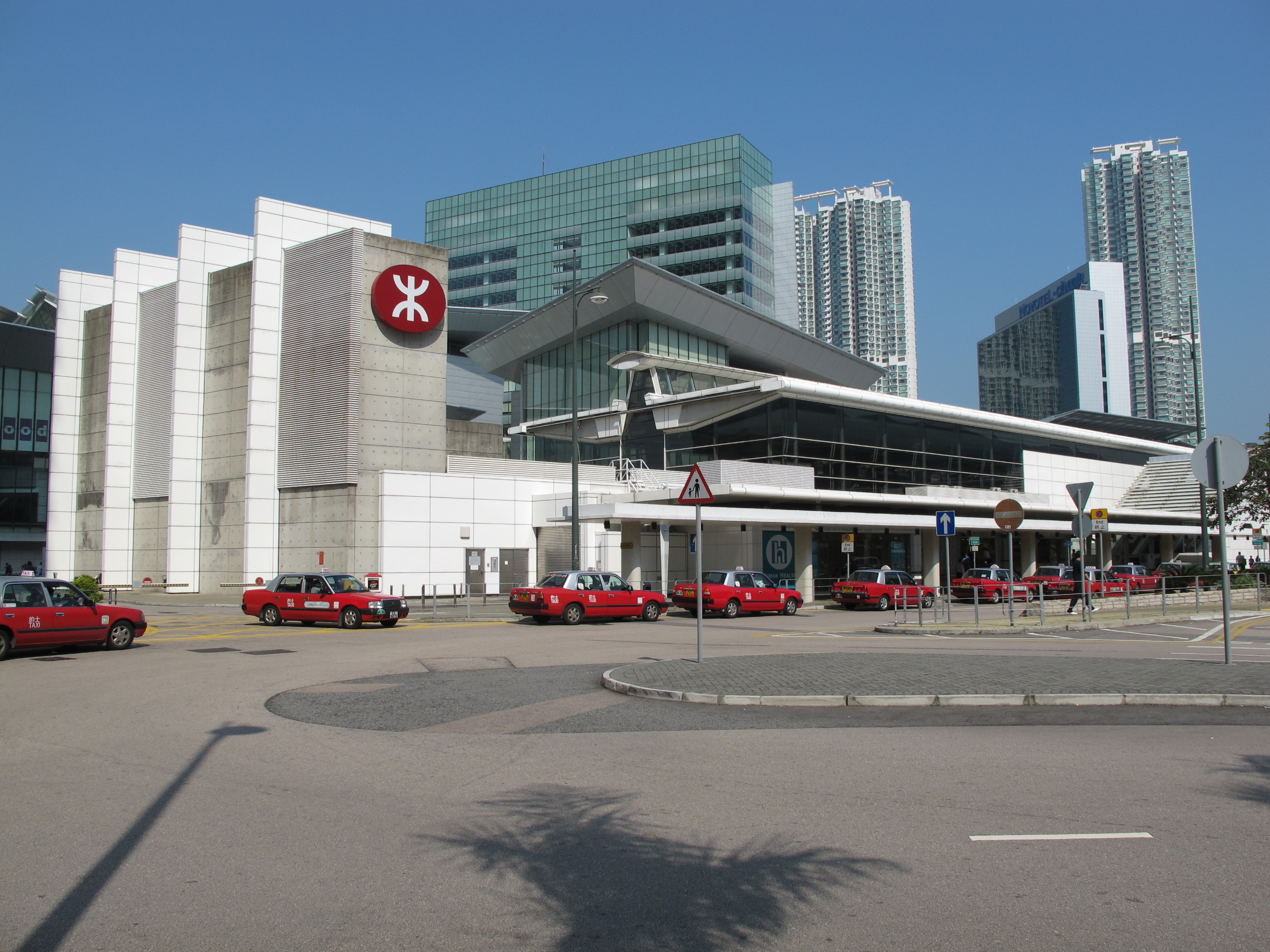 Tung Chung Station Outside view